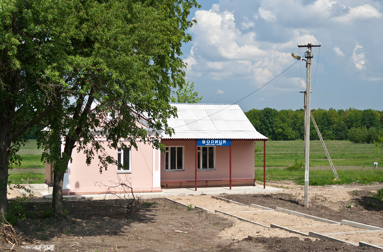 Вокзал станції Волиця